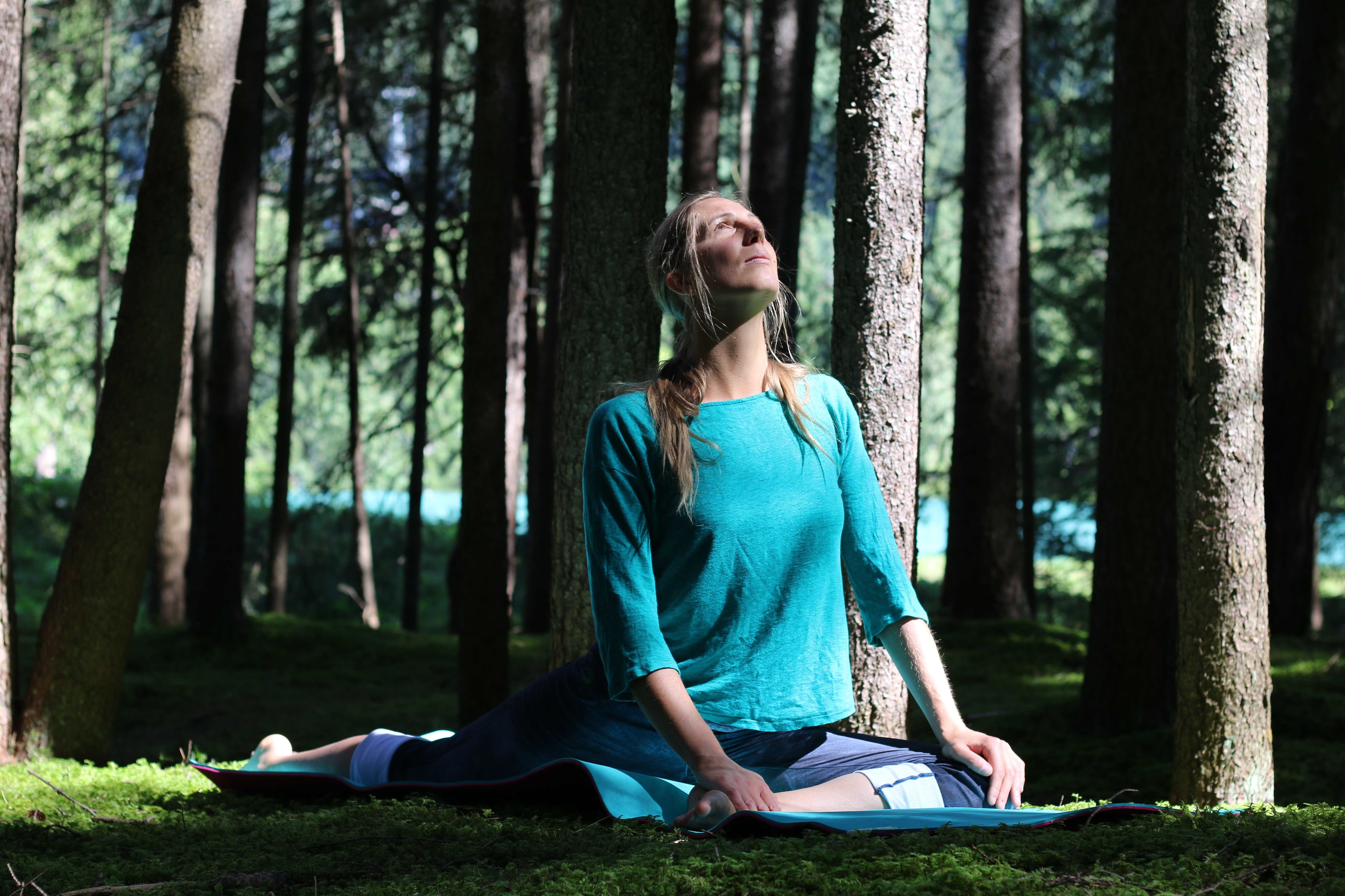 Insegnante di Samoy asd